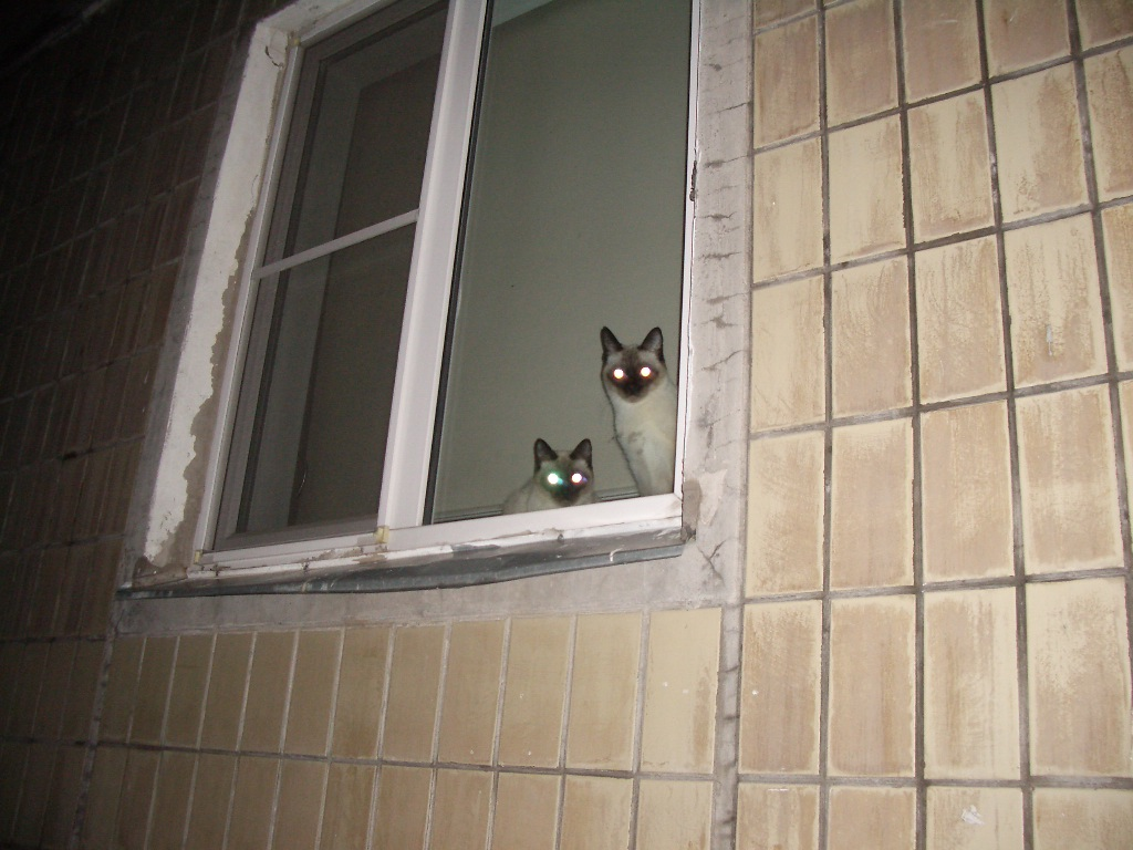 2 тайские кошки